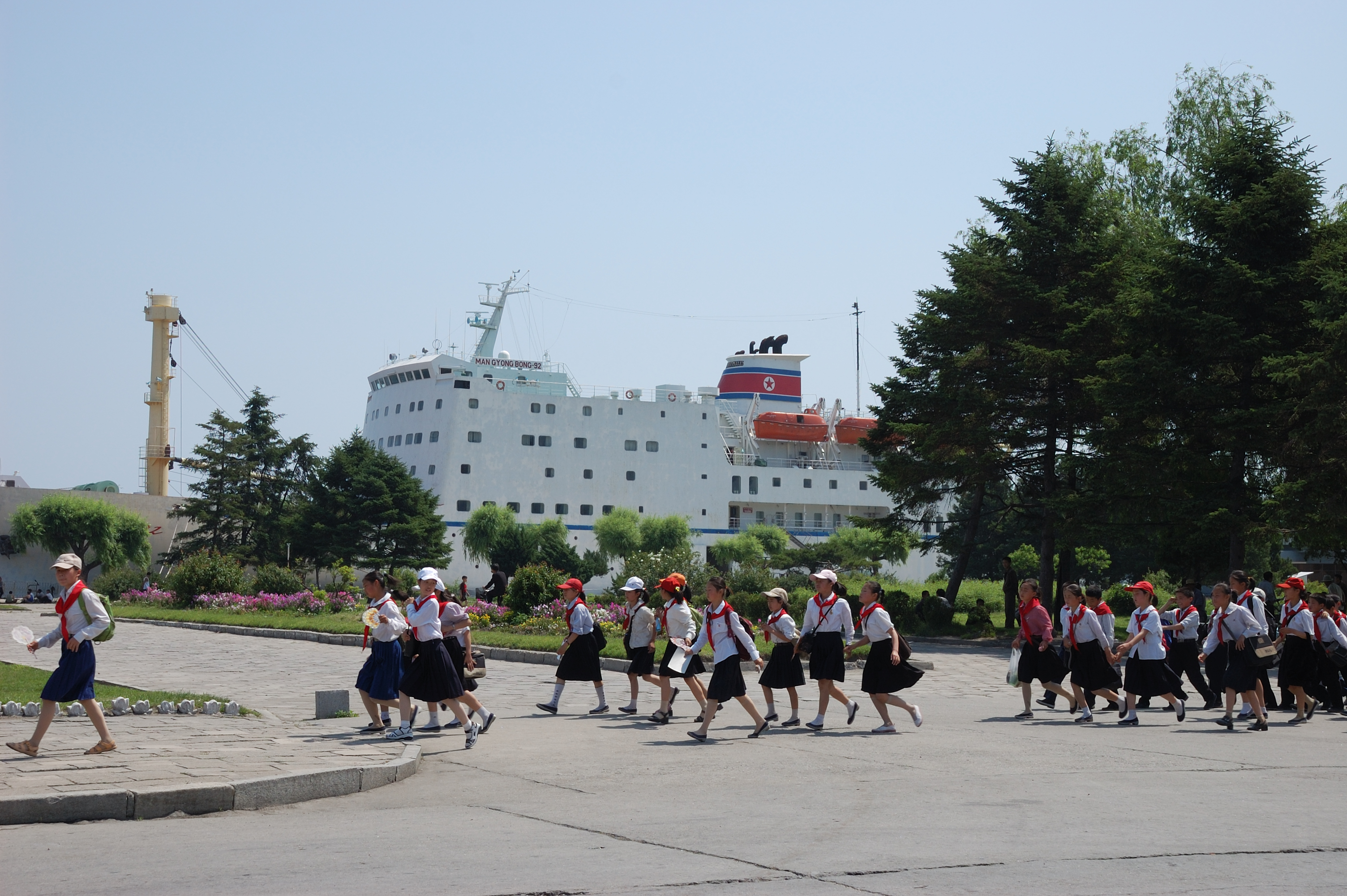 Mangyongbong-92. Wŏnsan, North Korea.Mangyongbong-92. Wŏnsan, North Korea.